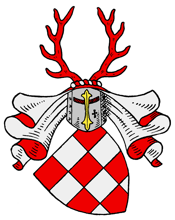 Wappen derer von Hohnstein